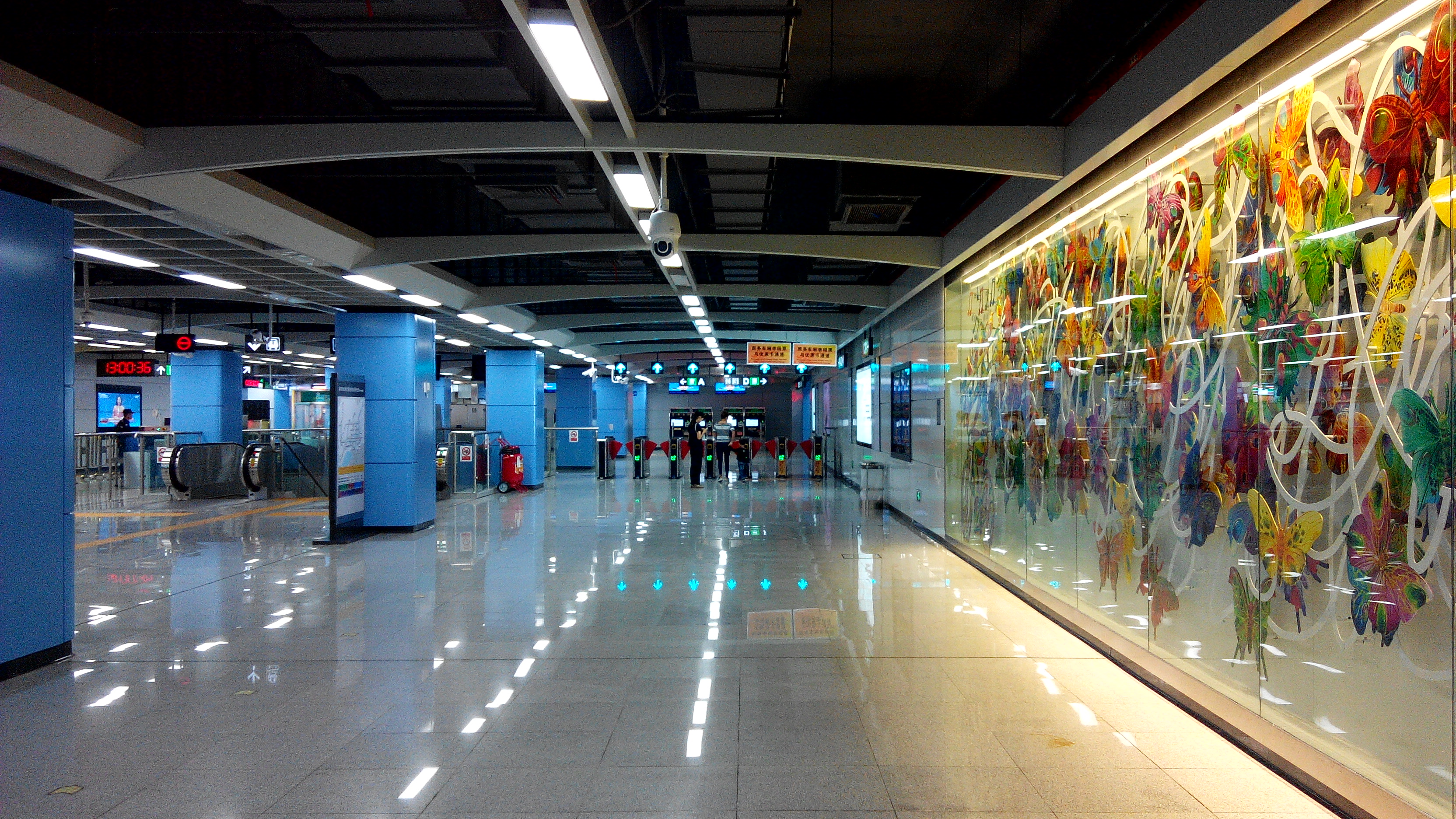 深圳地铁9号线 红岭南站大堂